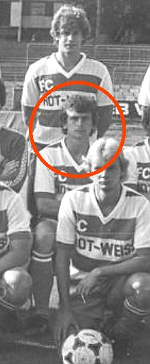 Title: Mannschaftsfoto FC Rot-Weiß Erfurt Factual corrections and alternative descriptions are encouraged separately from the original description. Additionally errors can be reported at this page to inform the Bundesarchiv. Original historic description: ADN-ZB-Ludwig-28.9.83-zin-Erfurt: Die Mannschaft des FC Rot-Weiß Erfurt für die Fußball-Oberligasaison 1983-84. Vorn v.l.n.r.: Andreas Thon, Martin Iffarth, Peter Jung, Uwe Weidemann, Frank Kräuter und Andreas Winter. Mittlere Reihe v.l.n.r.: Armin Romstedt, Hans-Joachim Teich, Jürgen Heun, Torhüter Michael Oevermann, Torhüter Wolfgang Benkert (Mannschaftskapitän), torhüter Thomas Stangner, Harald Fritz, Jörg Hornik und Martin Busse. Hinten stehend v.l.n.r.: Josef Vlay, Horst Linde, Olaf Berschuk, Carsten Sänger, Bernd Nemetschek und Klaus Goldbach.